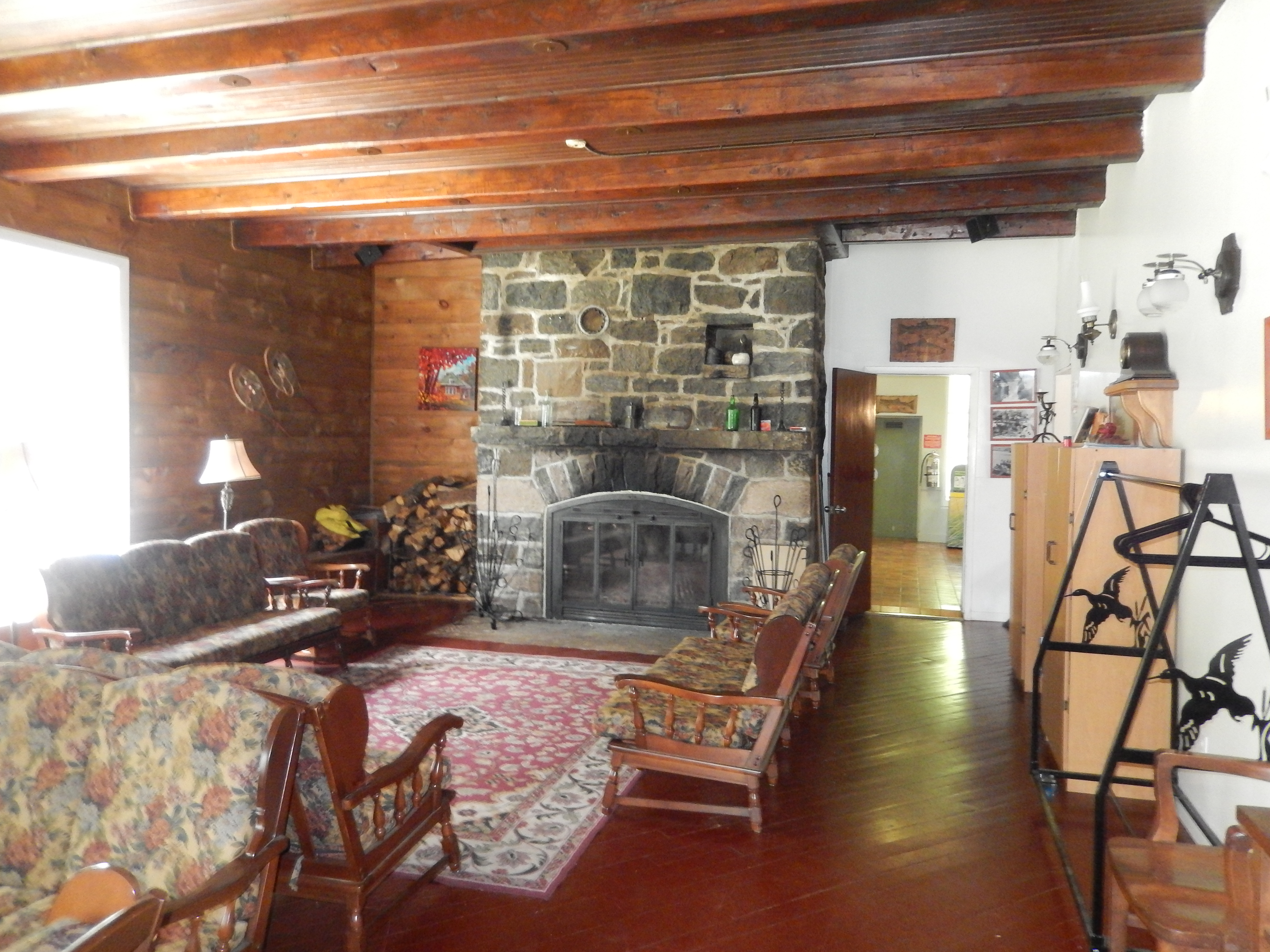 Chalet Wabenaki en juillet 2017.